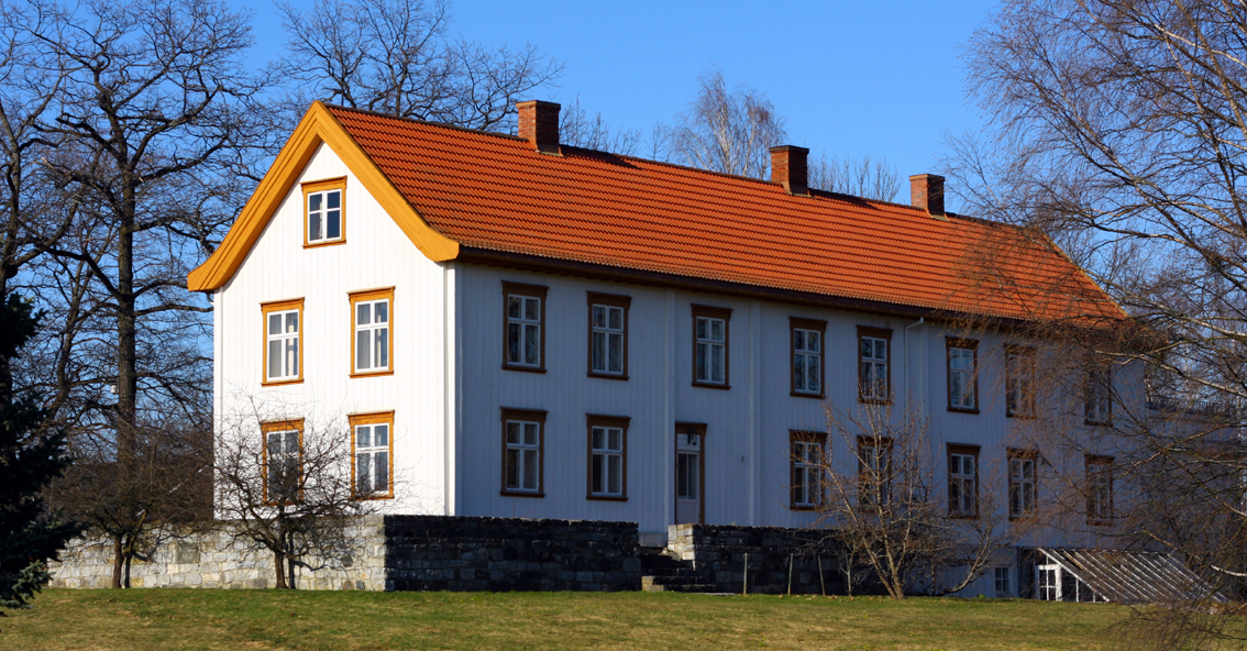 Sakslund, Stange, Norway.